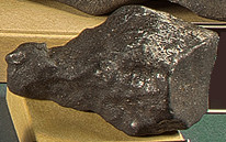 Bruderheim meteorite